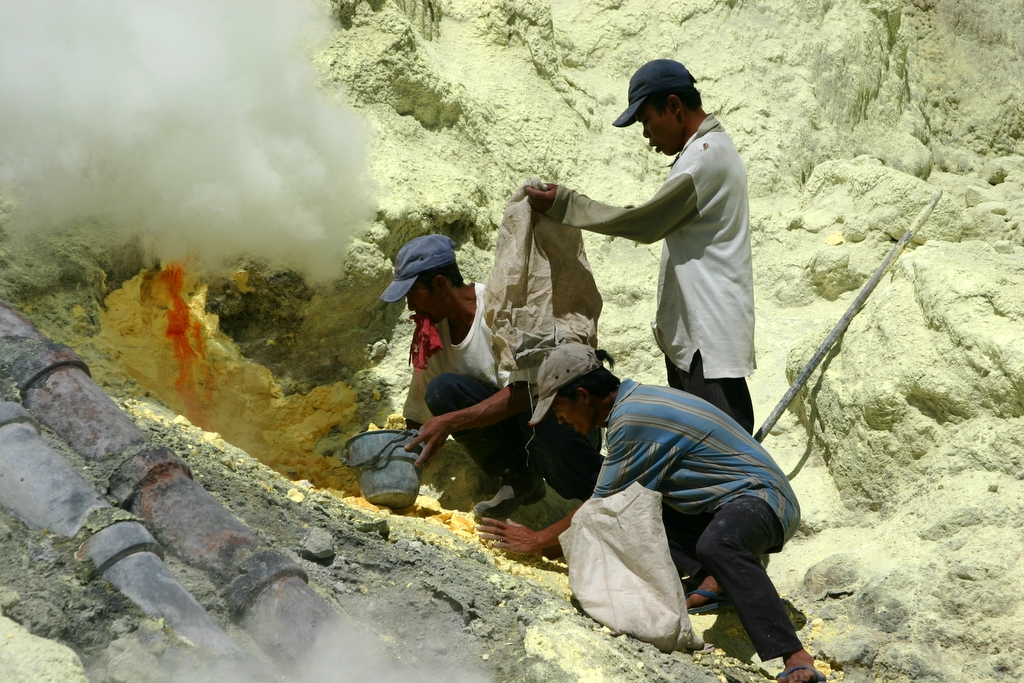 Sulfur mining operation at Kawah Ijen, Java Indonesia.